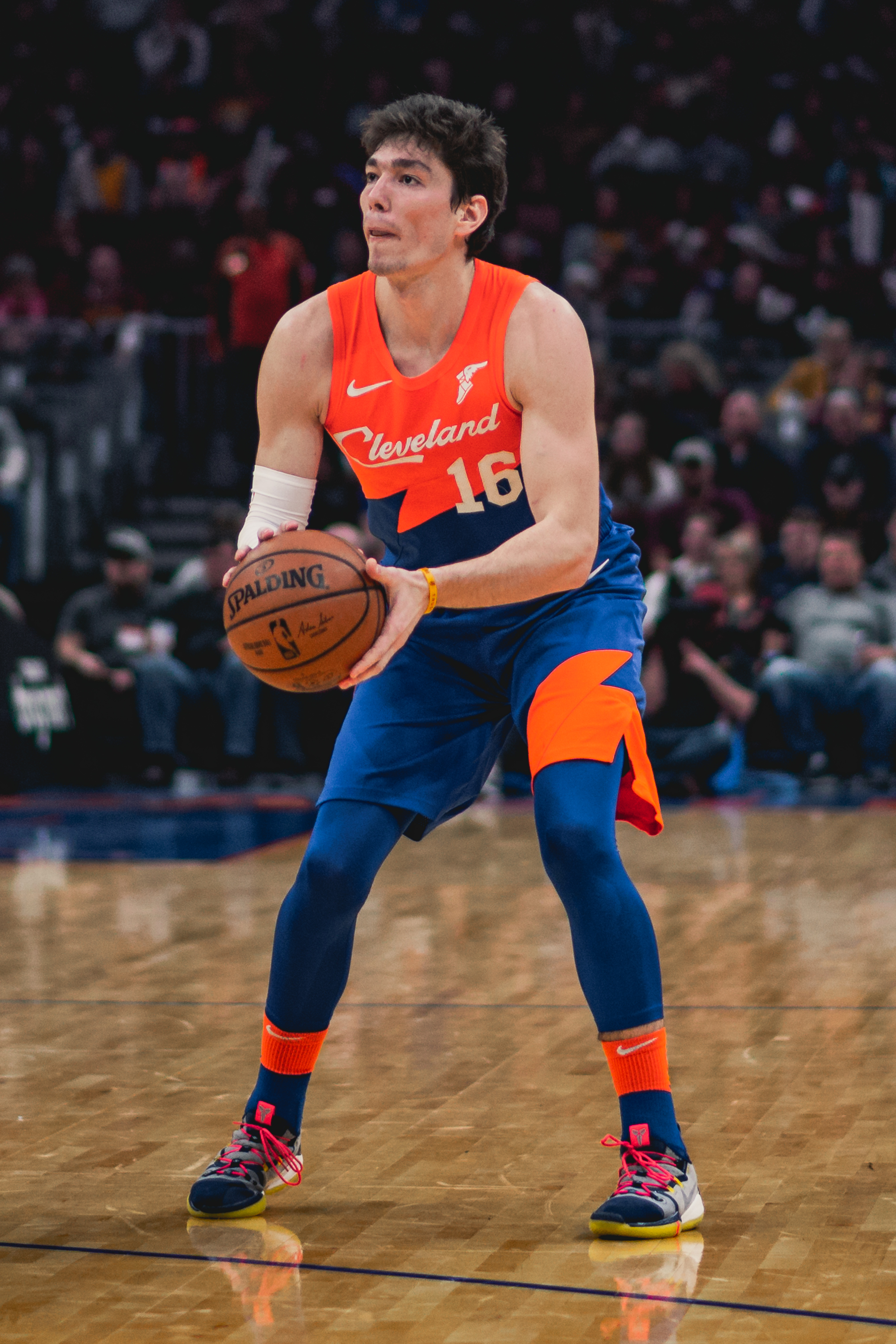 Cleveland Cavaliers vs. Brooklyn Nets